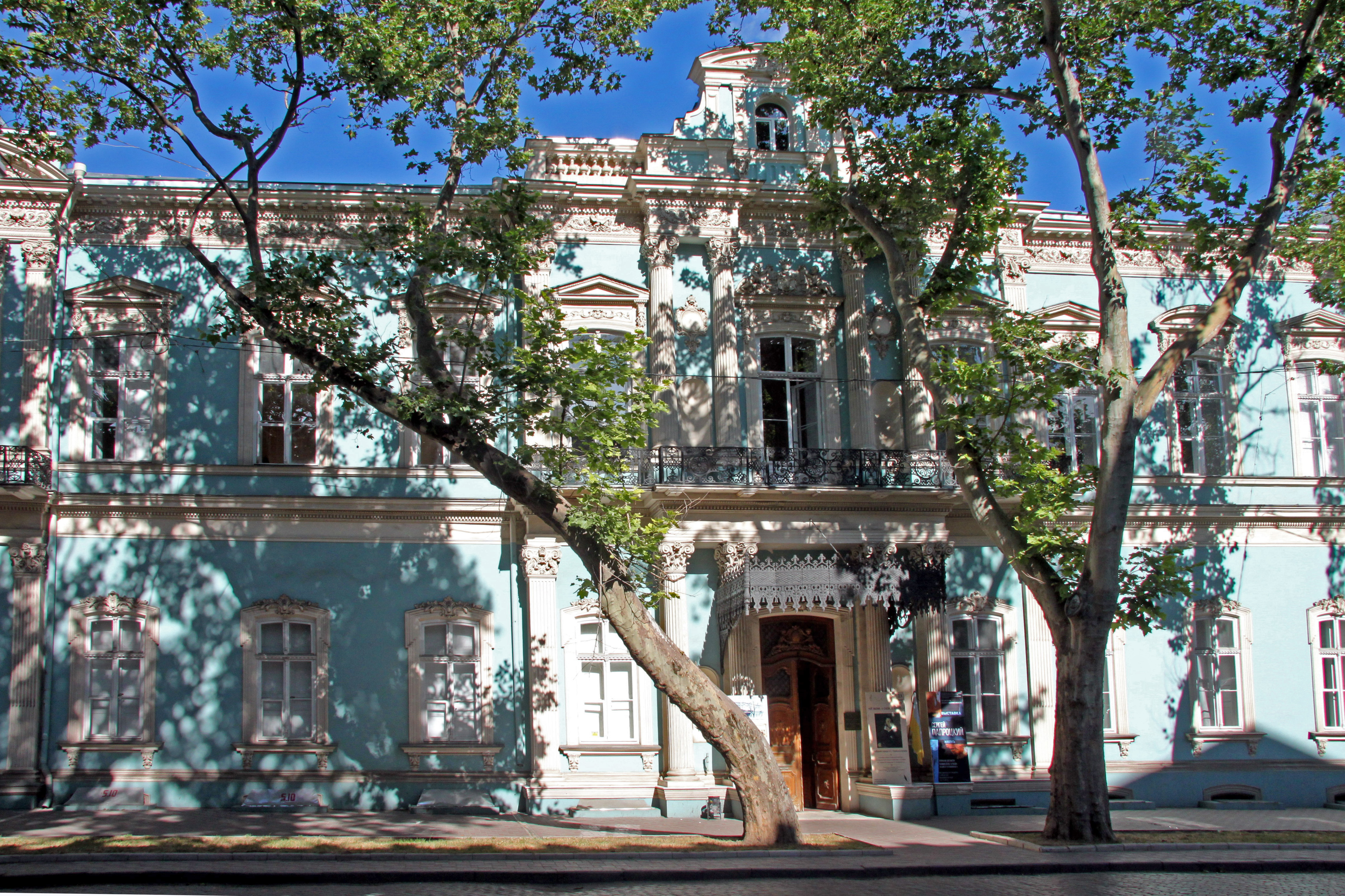 Палац Абази, в якому жили: у 1920–1942 роках Мітковіцер П.В. — живописець; у 1944–1957 рр. Фраерман Т.Б. — художник, учень П.Пікассо; Зейлінгер О.Д. — мистецтвознавець, професор, Пушкінська вул., 9 (ріг вул. Грецької, 16), Одеса